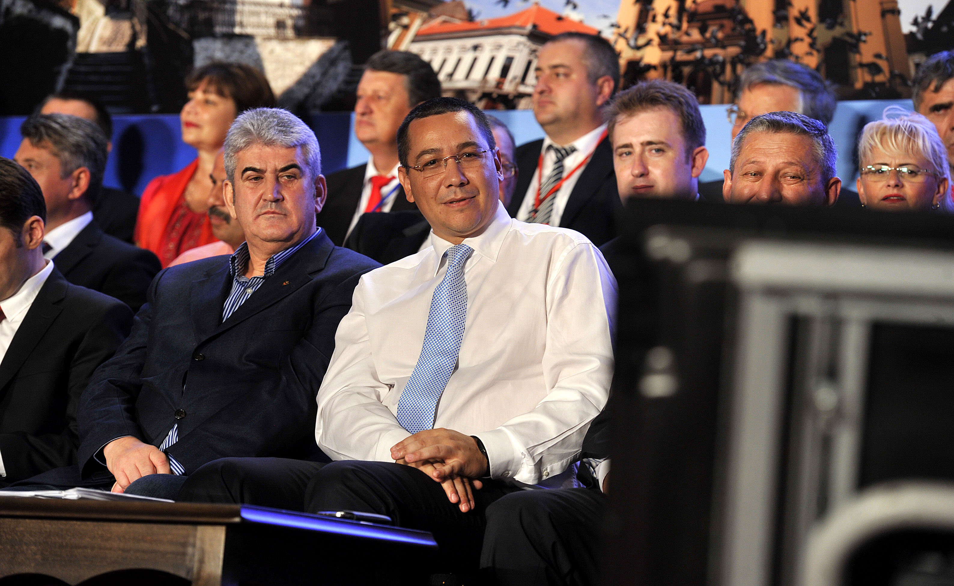 Congresul National al PSD, Alba Iulia - 12.09 (15)